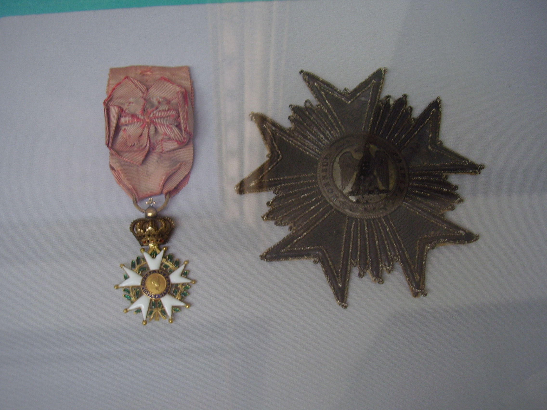 Royal Military Museum Brussels, Musée Royal de l'Armée, Koninklijk Museum van het Leger en de Krijgsgeschiedenis